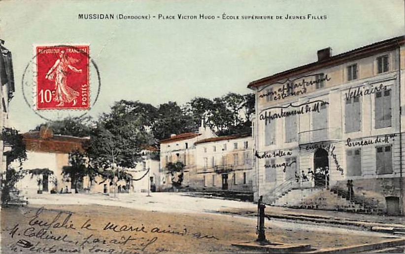 École Primaire supérieure de jeunes filles de Mussidan (Dordogne), surécrite, carte postale ancienne (non grevée de droits).